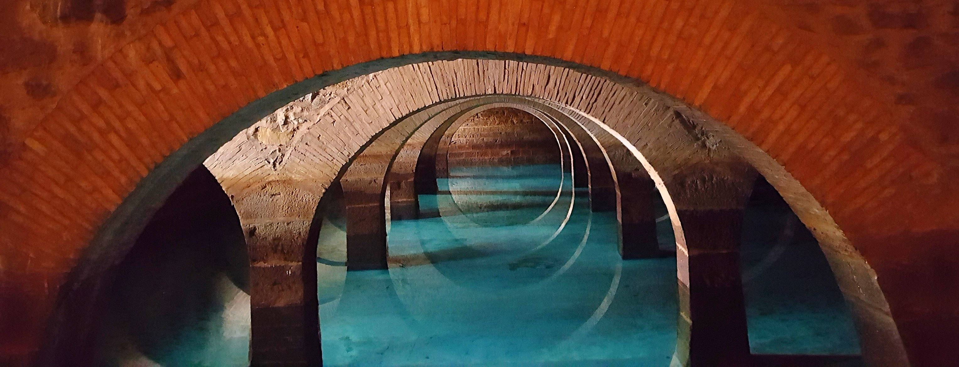 Mendillorriko ur-biltegia